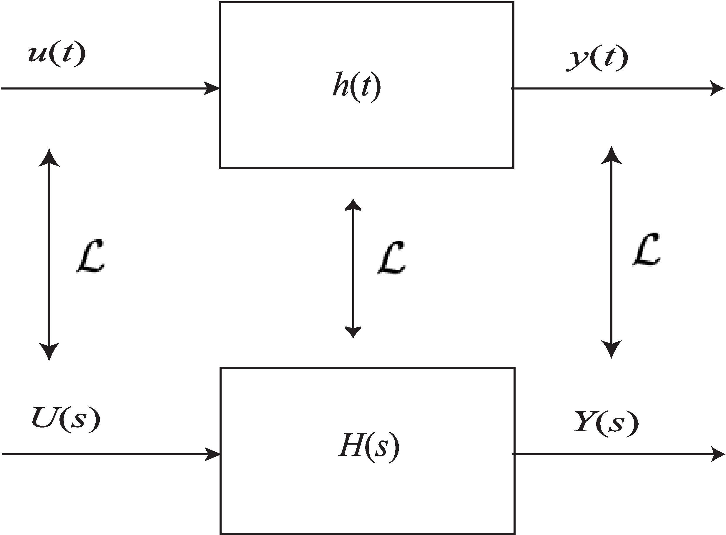 Samanhengen mellom tidskontinuerleg impulsrespons og transferfunksjon.